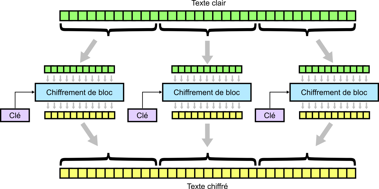 Mode d'opération de type ECB Dessiné par Dake avec Inkscape.